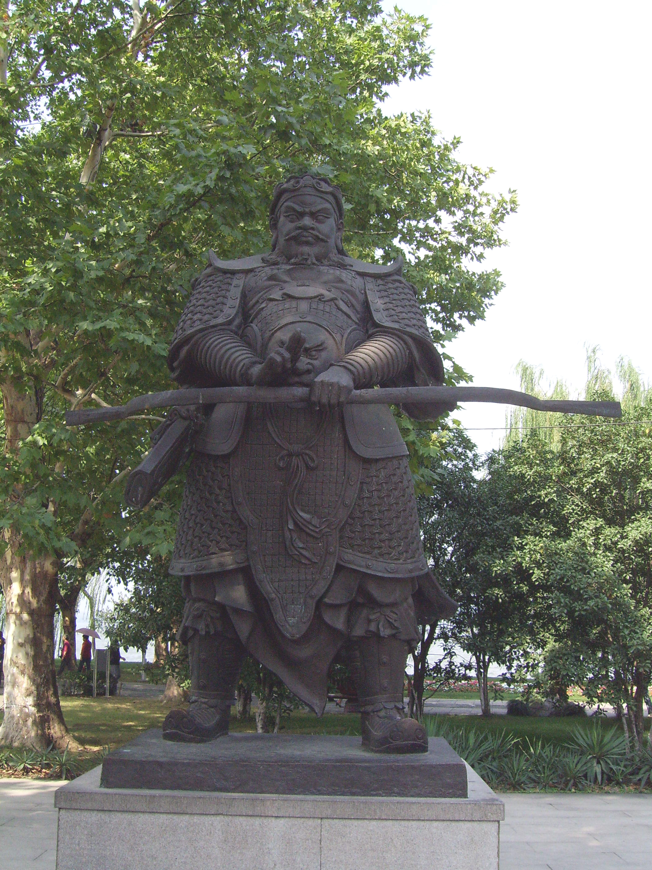 吴越国的创立人钱镠雕像，拍摄于柳浪闻莺。